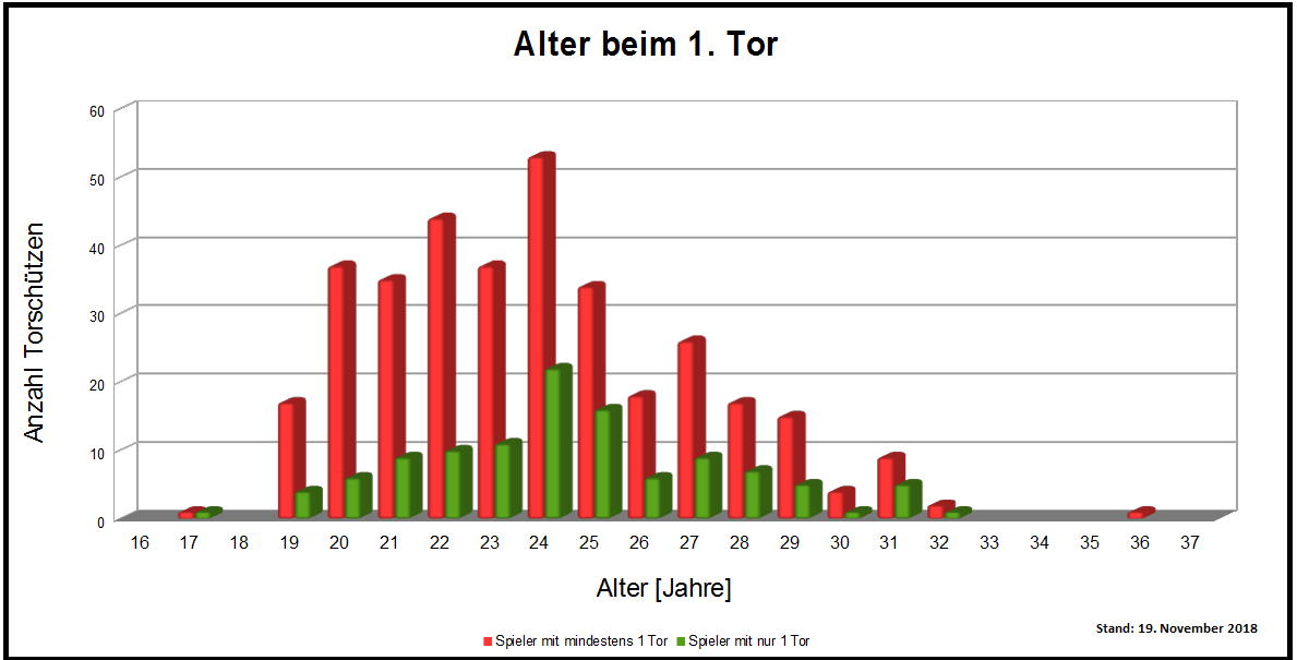 Altersverteilung der Torschützen der deutschen Fußballnationalmannschaft beim 1. Tor, Stand 11.8.2010